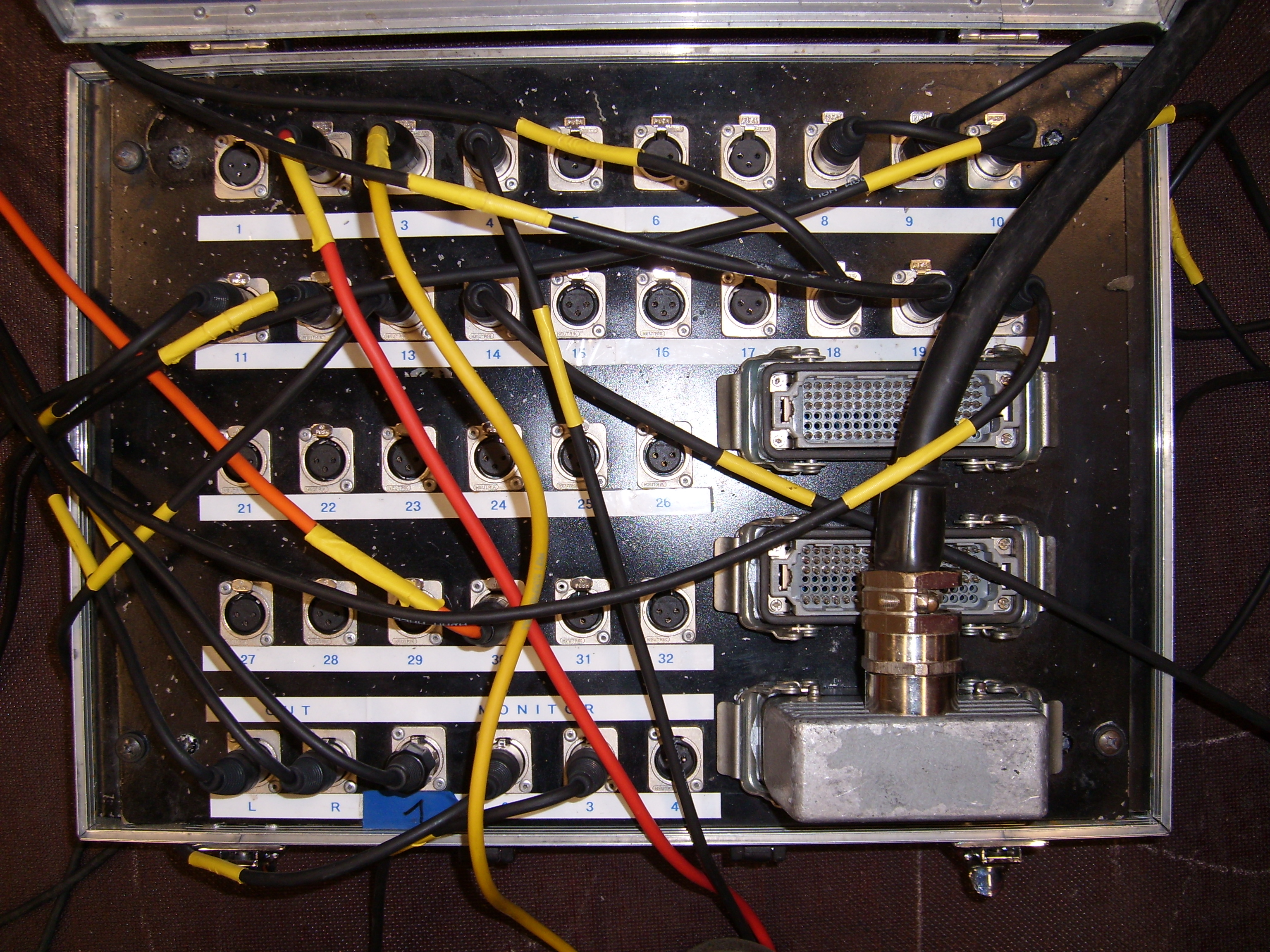 Stagebox